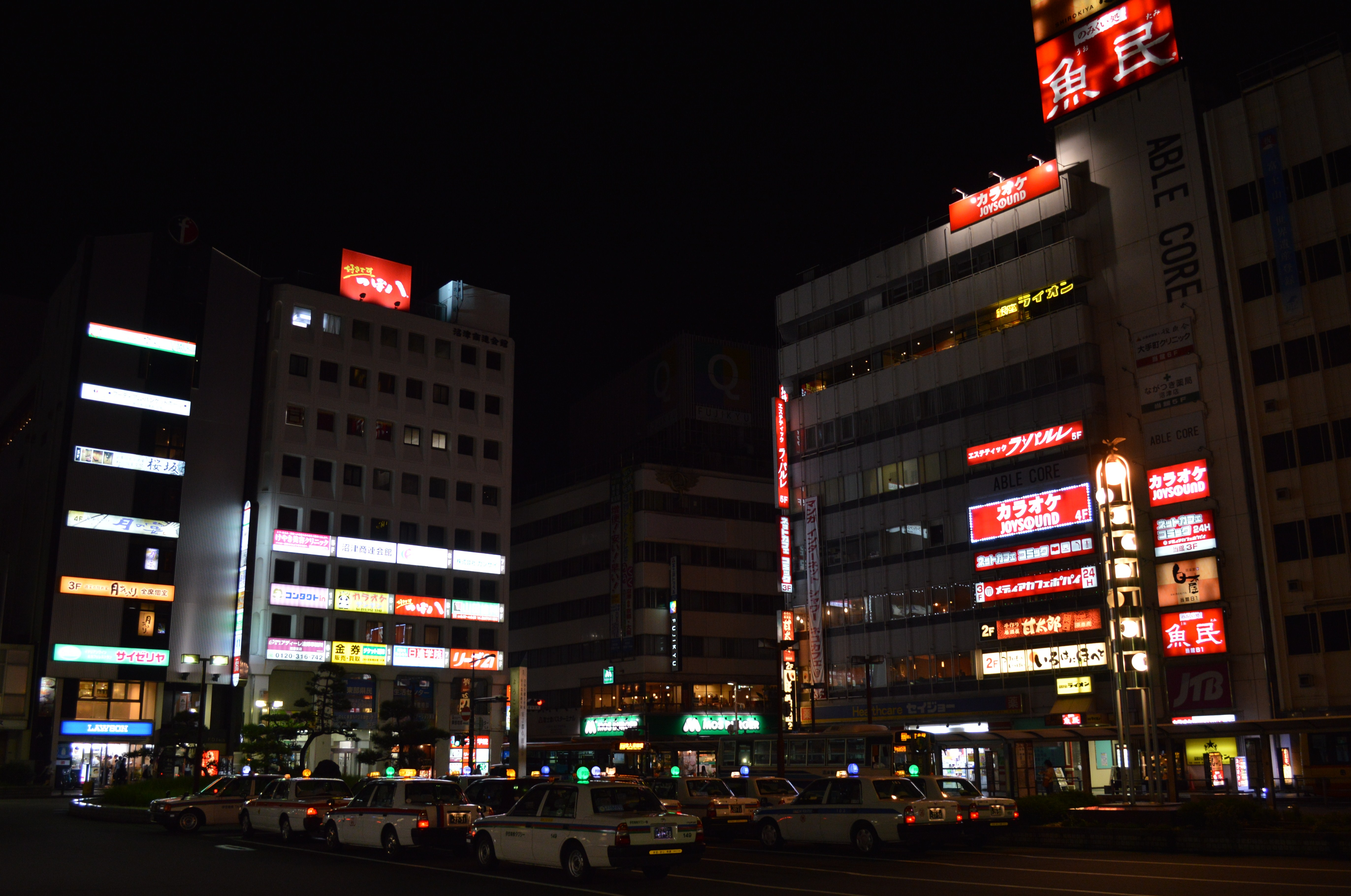 静岡県沼津市、夜の沼津駅前